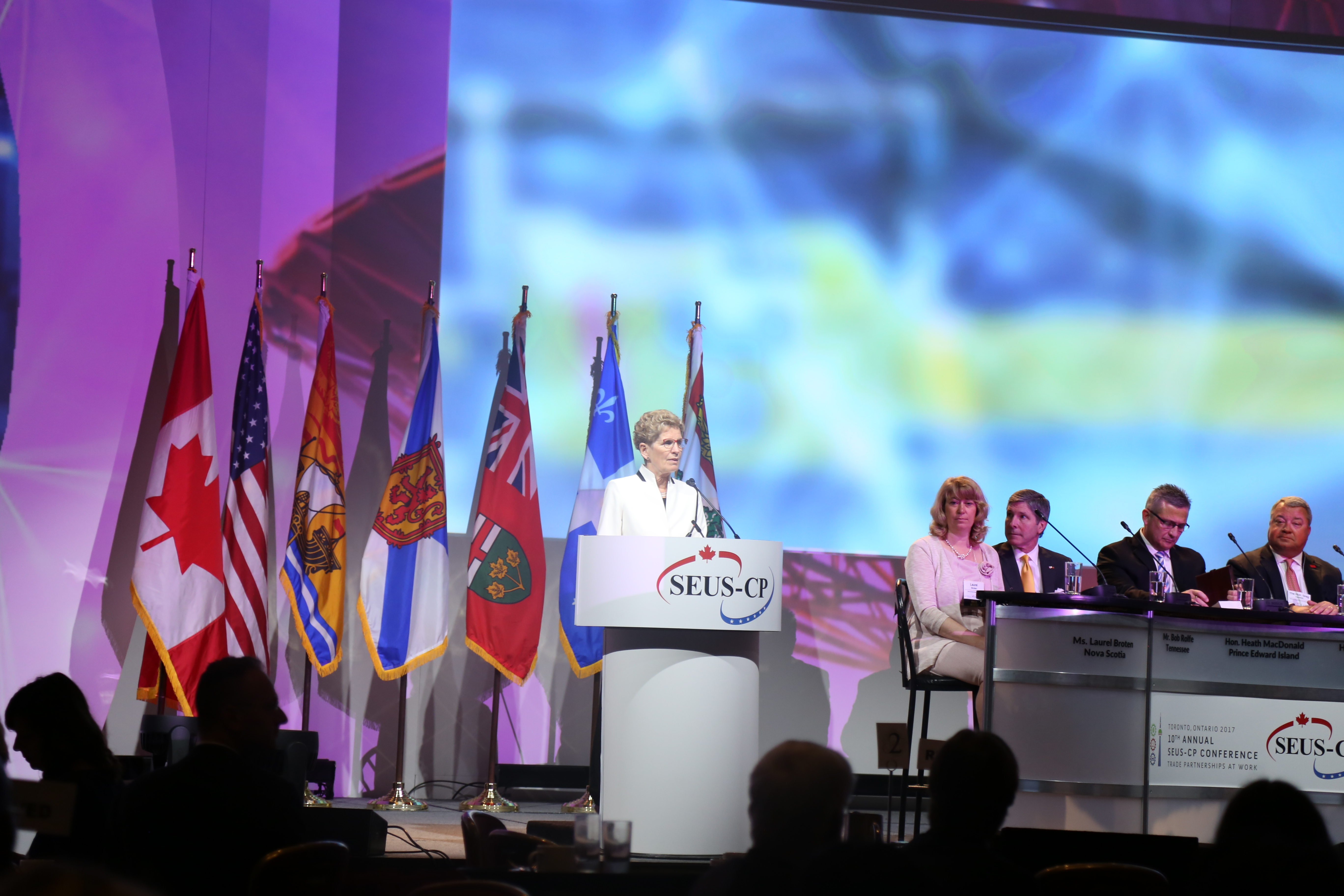 SEUS-CP 2017